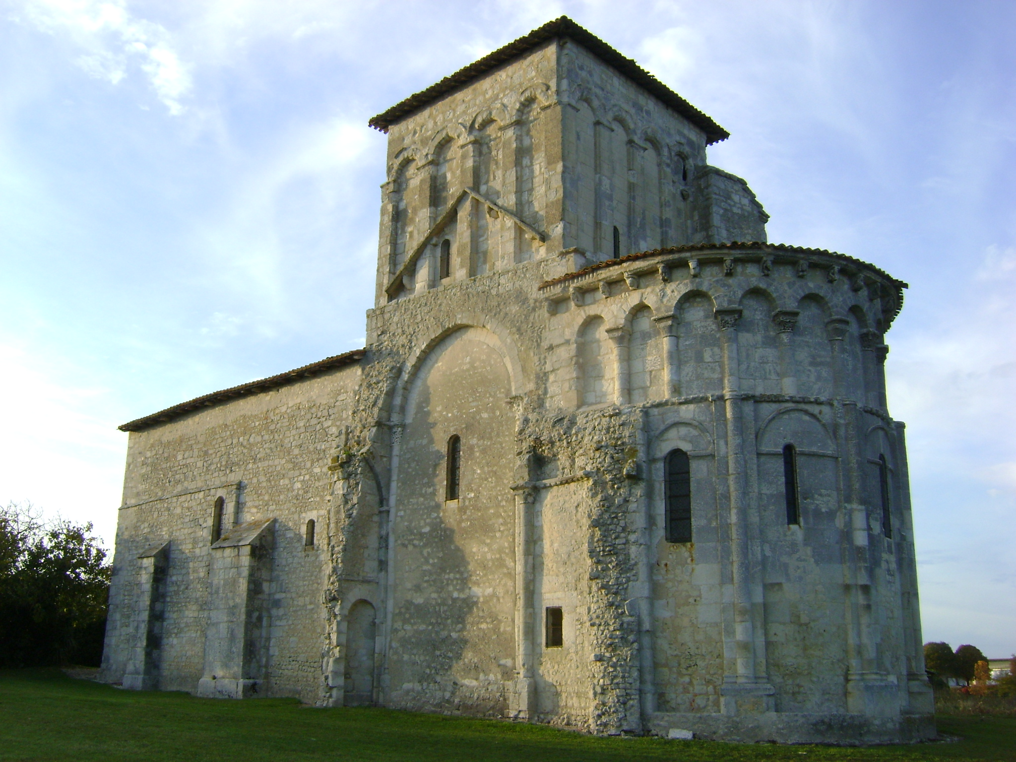 Eglise de Conzac, Saint-Aulais-la-Chapelle, Charente. Vue générale coté sud-est. .